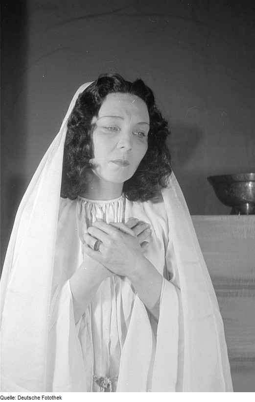 Original image description from the Deutsche Fotothek In der Hauptrolle Hilde Körber als Sappho